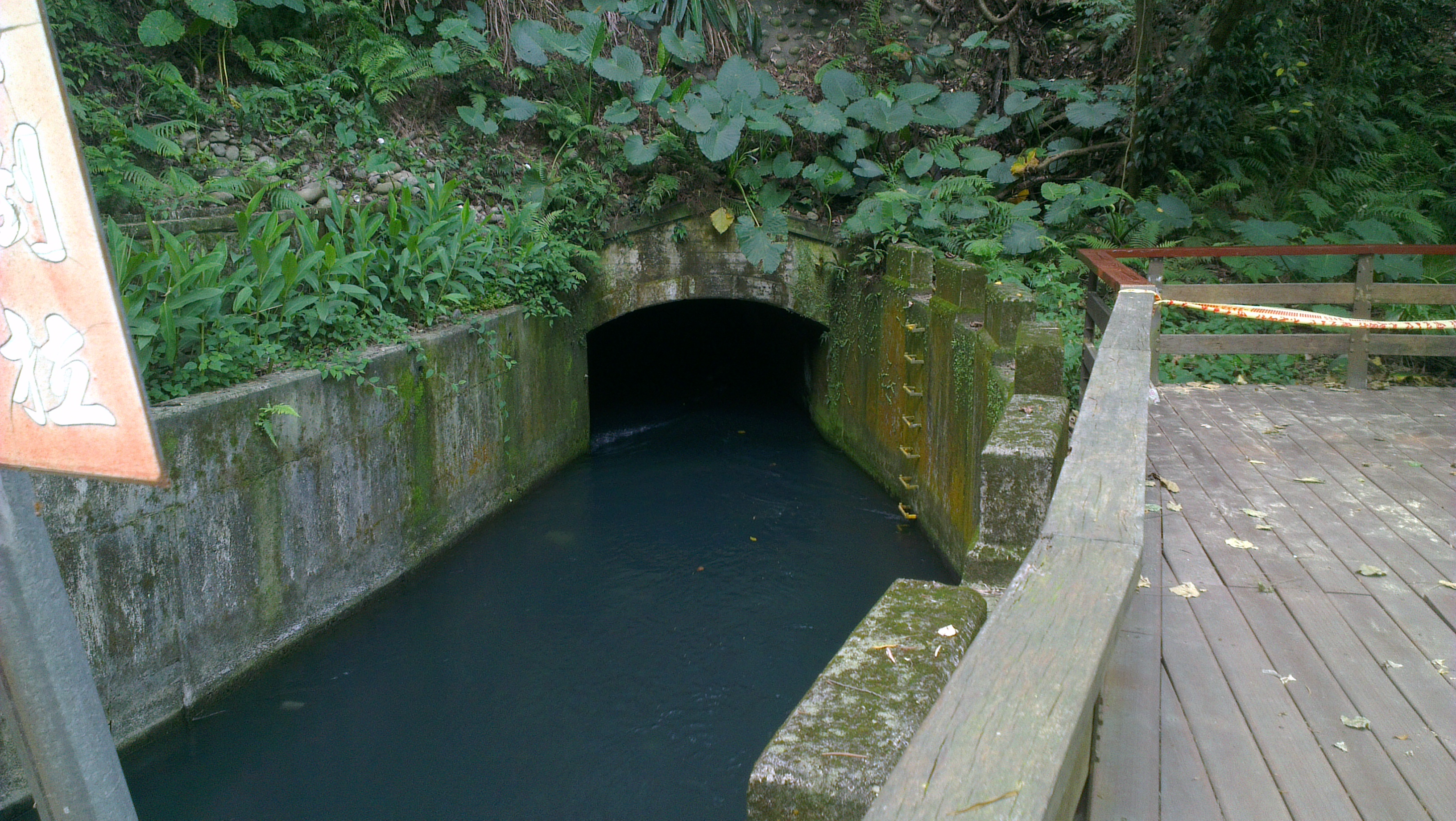 中文（台灣）: 石門大圳2號隧道入口.jpg